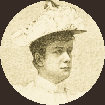 Pauline Strauss-de Ahna, Gattin von Richard Strauss